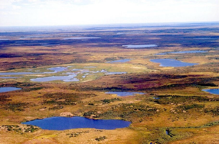 Tundra bei Dudinka am Jenissej in Sibirien